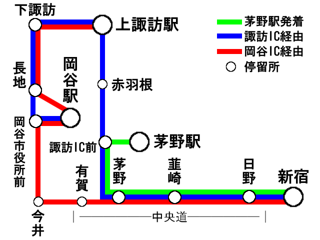 中央高速バス新宿 - 諏訪・岡谷線路線図